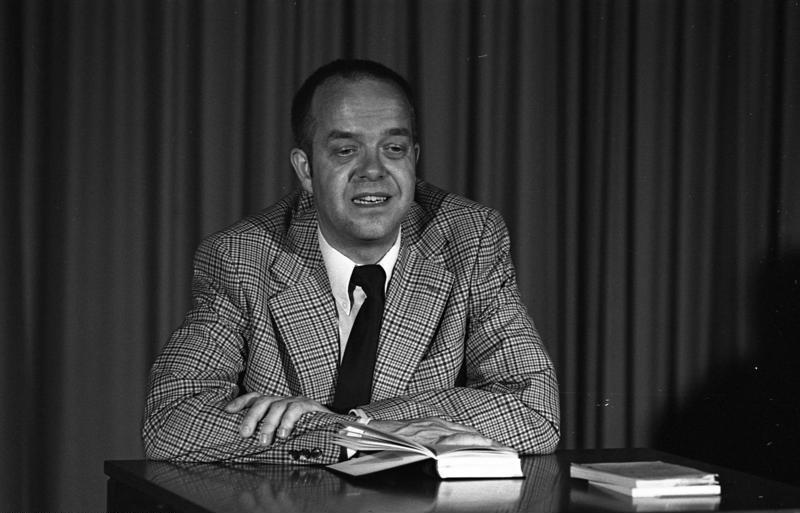 Dichterlesung (Stefan Wigger) in der Landesvertretung Berlin